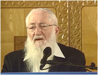 הרב ולדמן